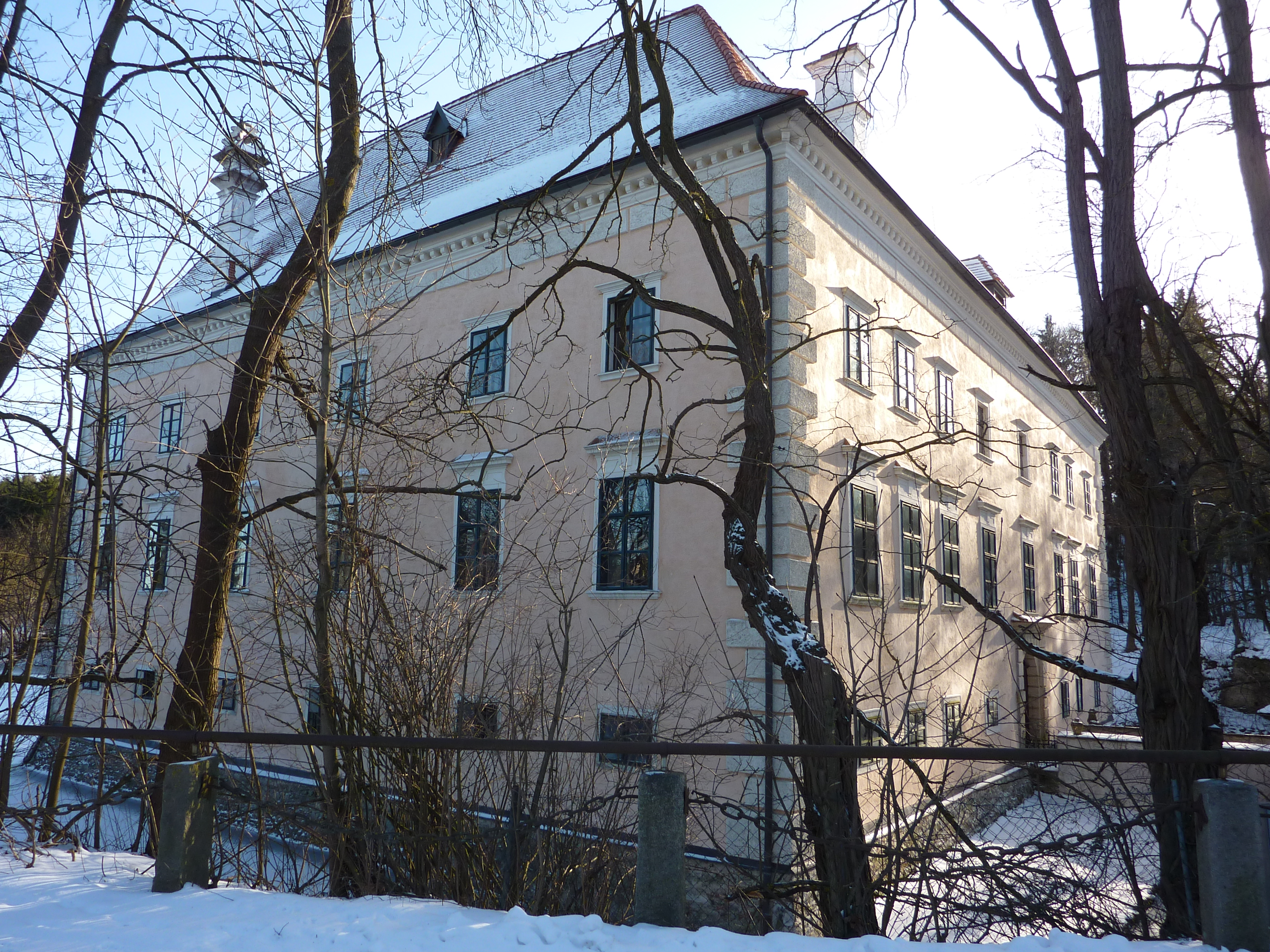 Schloss Brunn, Brunn am Wald 1, Lichtenau im Waldviertel, Niederösterreich